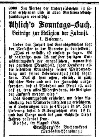 Anzeige der Stollbergschen Buchdruckerei und Verlagsbuchhandlung im Frankfurter Journal, Ausgabe 7/9 des Jahres 1858 (Link zum Digitalisat des Journals).